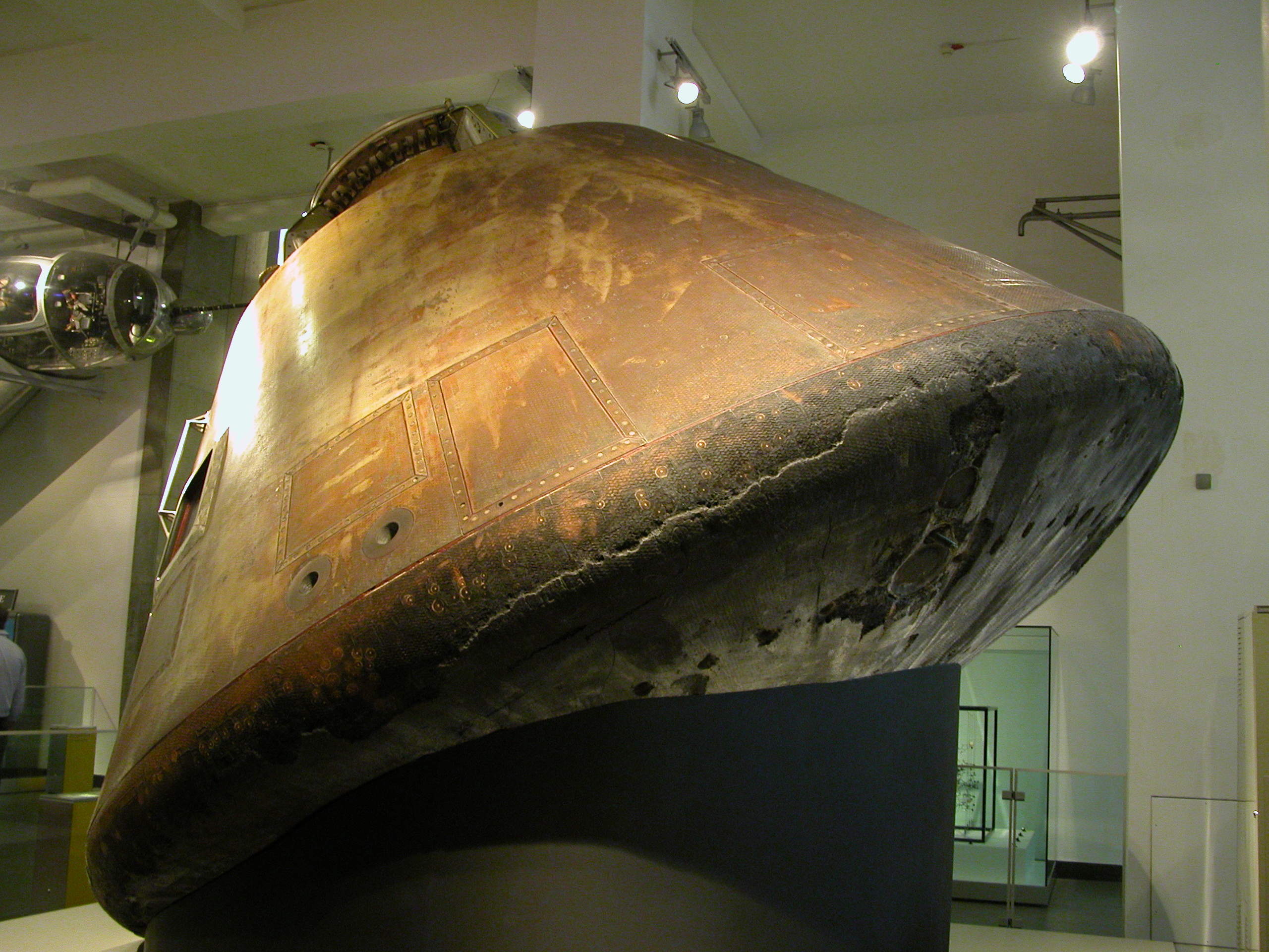 Description Module de Commande de la mission Apollo X exposé au Musée des Sciences de Londres (Mai 2009) Date5 May 2009SourceOwn Work (Bruno Barral)AuthorBruno Barral (ByB)Permission (Reusing this file) (licence CC-BY-SA-2.5) Module de Commande de la mission Apollo X exposé au Musée des Sciences de Londres (Mai 2009)